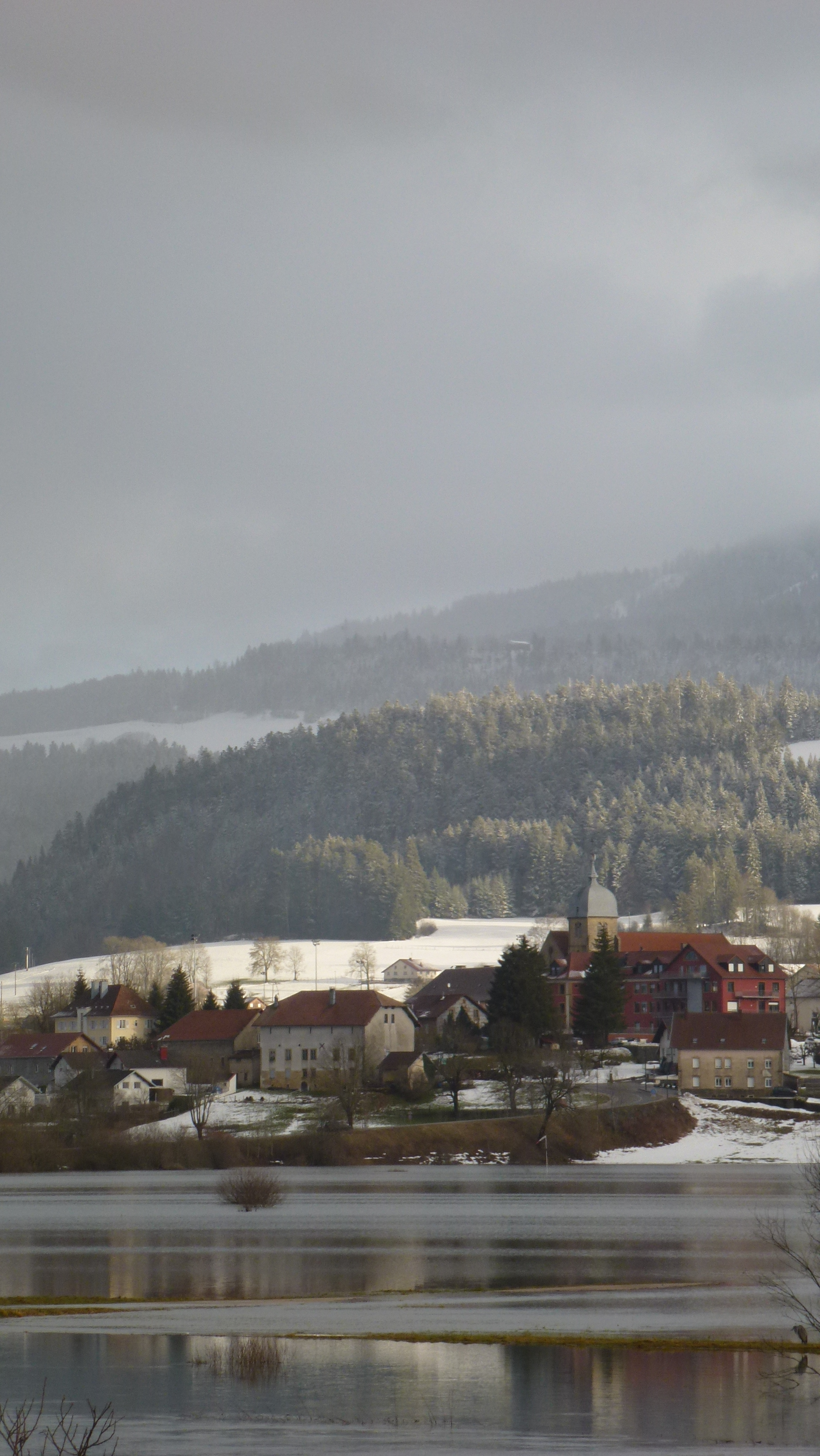 La Haute Vallée du Doubs. Le Val de Morteau inondé. Montlebon. Paysage hivernal.